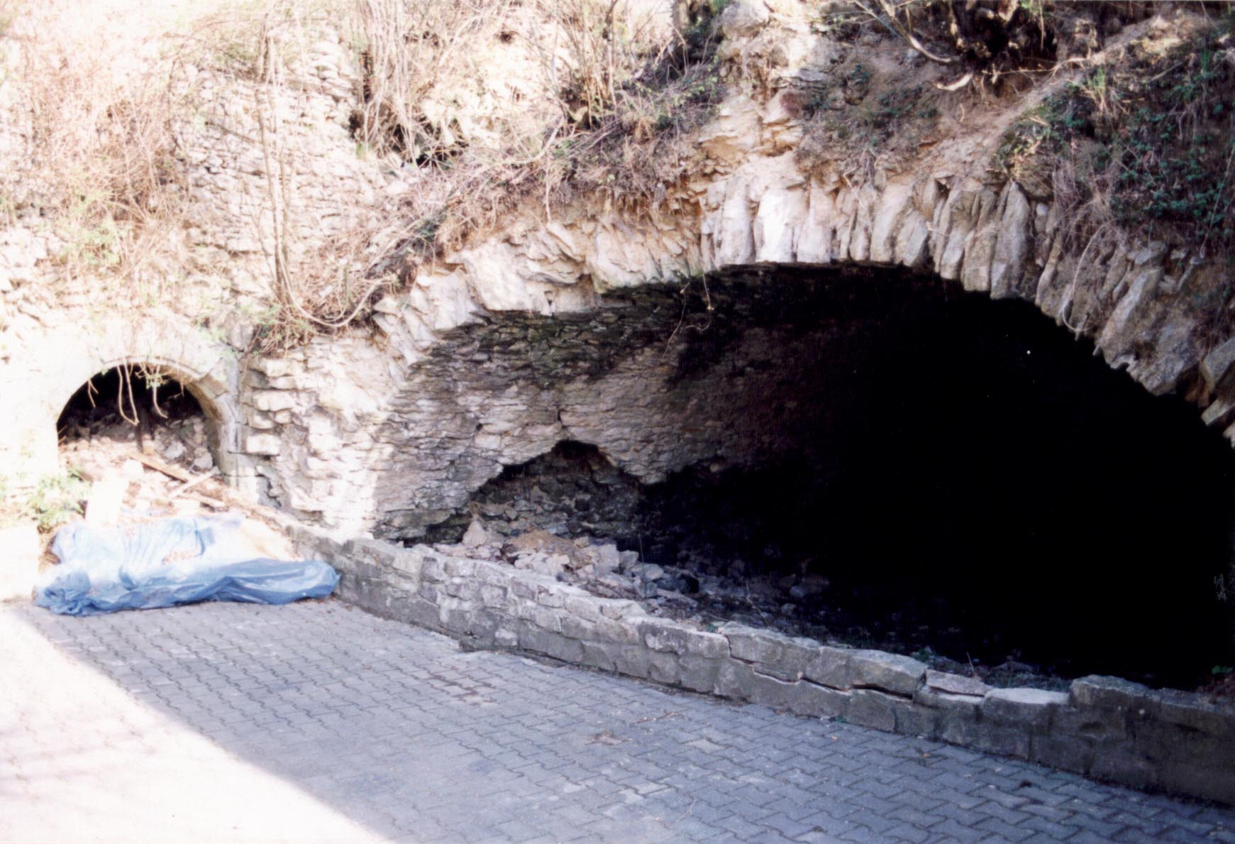 Burgruine Regensberg, Reste eines Kellergewölbes